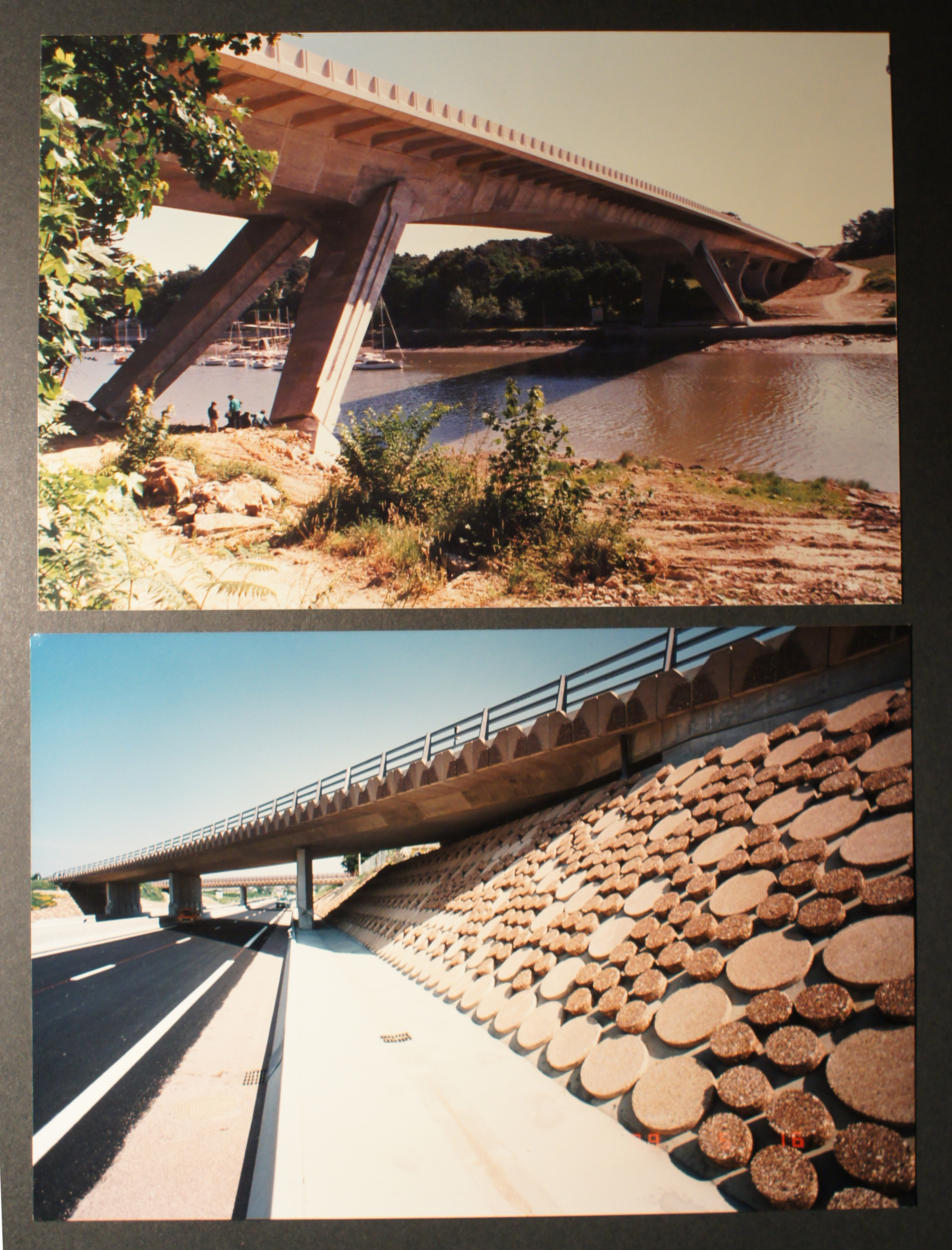 Photos ouvrages d'art